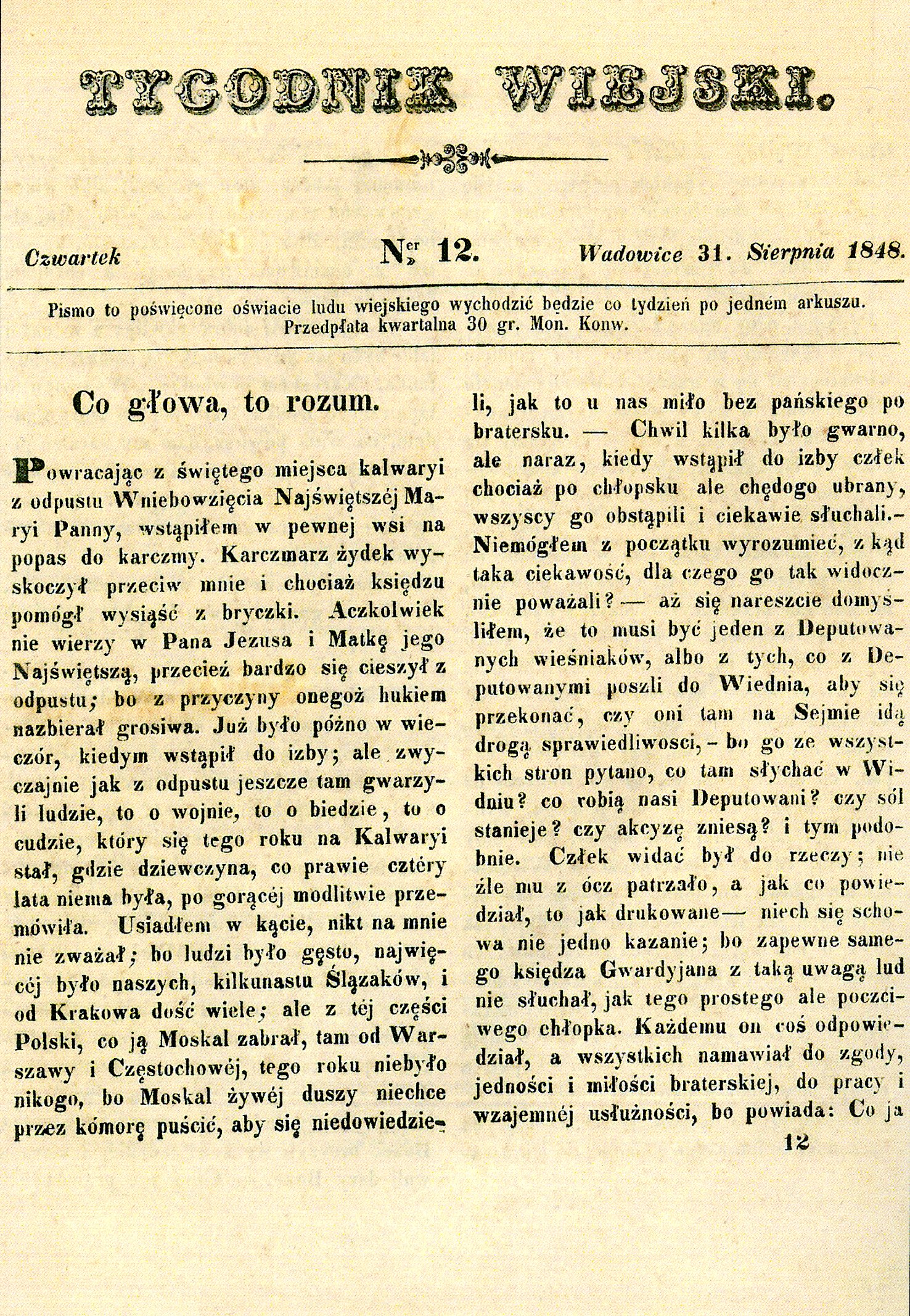 facsimile felietonu Adama Gorczyńskiego z Tygodnika Wiejskiego, 31 sierpnia 1848